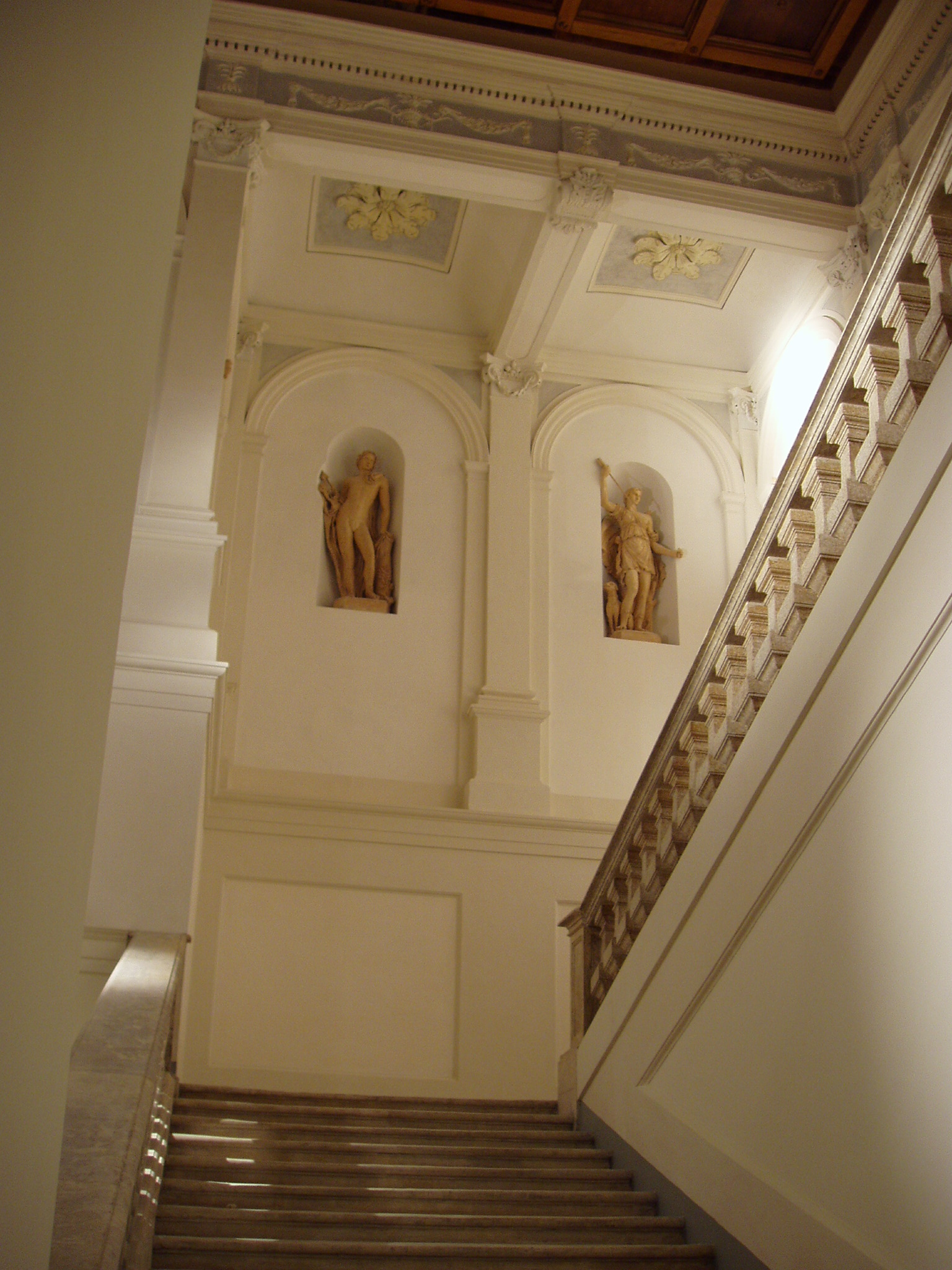 Lucio De Marcellis, foto personale, Scalinata di Palazzo Delfico a Teramo, licenza GFDL, Licensing Categoria:Immagini di Teramo